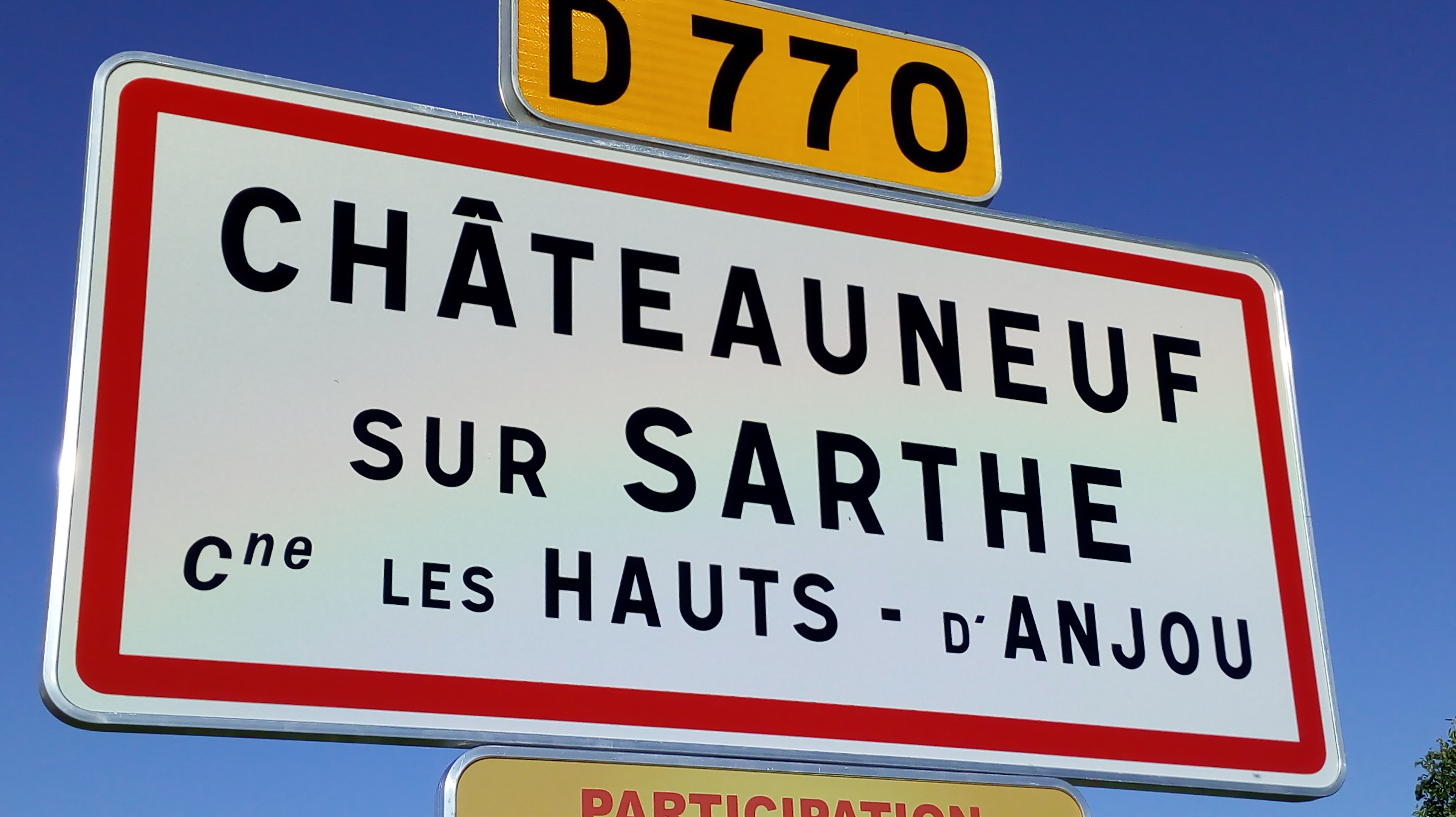 Panneau d'entrée de village à Châteauneuf-sur-Sarthe (Maine-et-Loire, France).